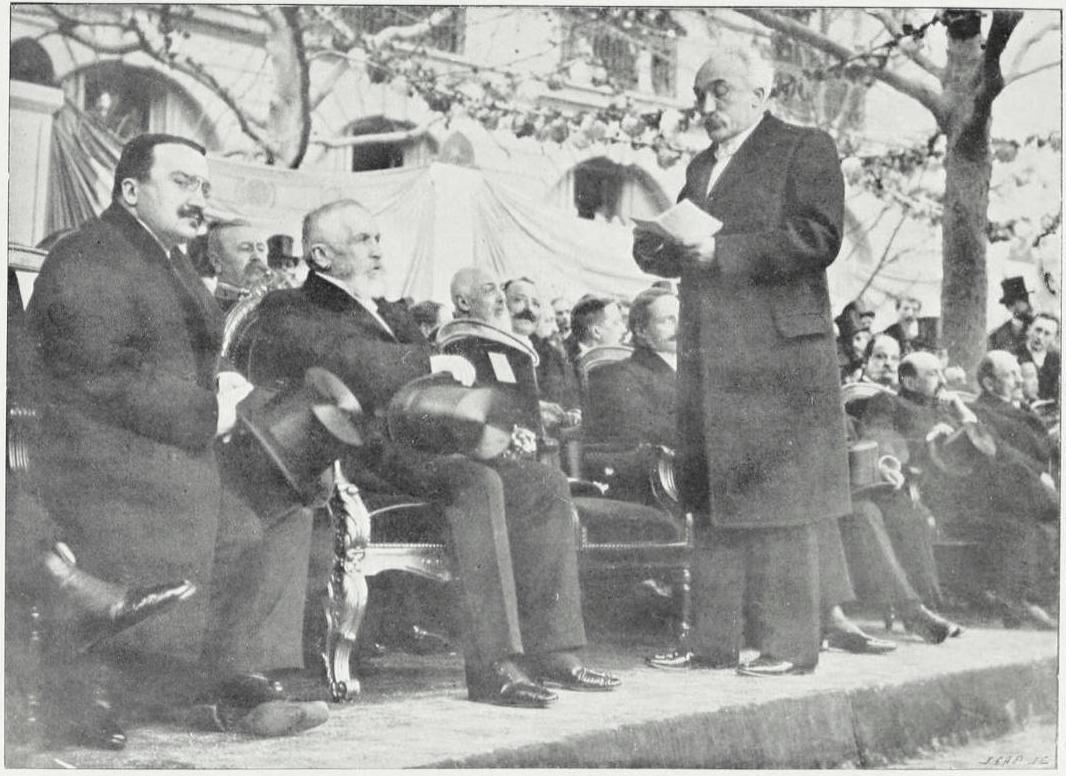 "Inauguration du monument de la place Victor-Hugo. [26/02/1902] Discours de M. de Selves, Préfet de la Seine." (Premier rang : Louis Dausset, président du conseil municipal de Paris - Émile Loubet, président de la République française - Justin de Selves (debout), préfet de la Seine - Paul Deschanel (partiellement caché), président de la Chambre des députés - Paul Meurice (caché, derrière De Selves) - Georges Leygues, ministre de l'Instruction publique - Adrien Veber, président du conseil général de la Seine).